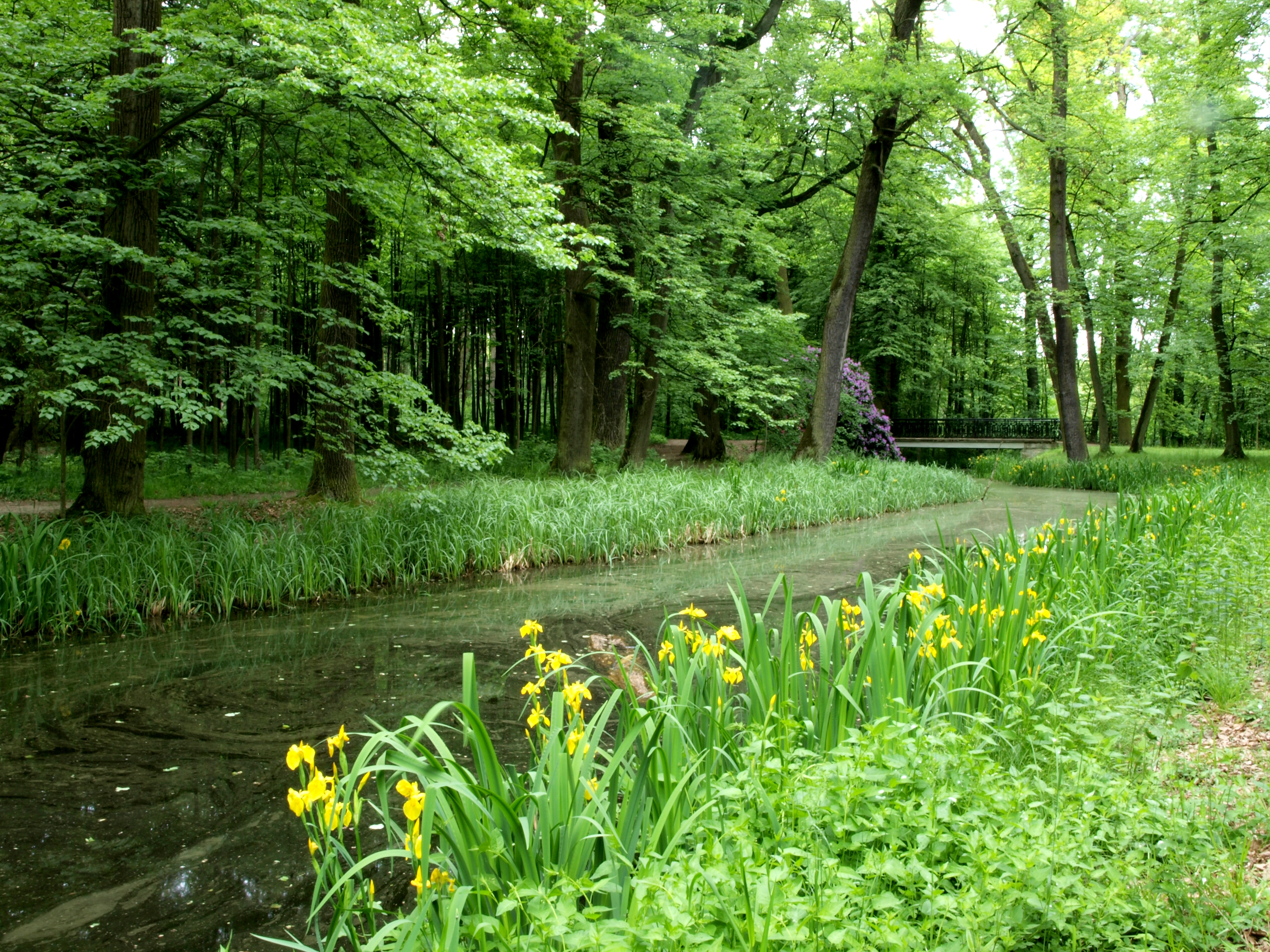 Moszna, park, XVIII, XIX/XX